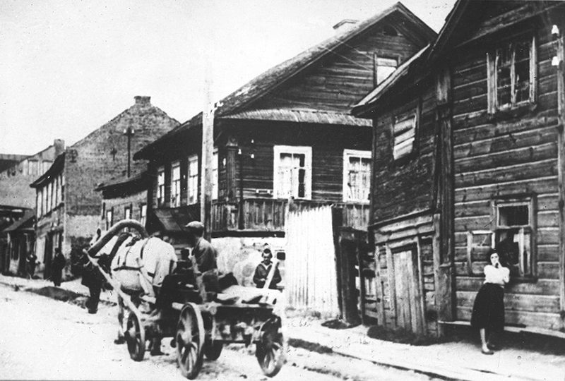 Беларуская (тарашкевіца): Менск (Miensk), вуліца Кашарская (vulica Kašarskaja)